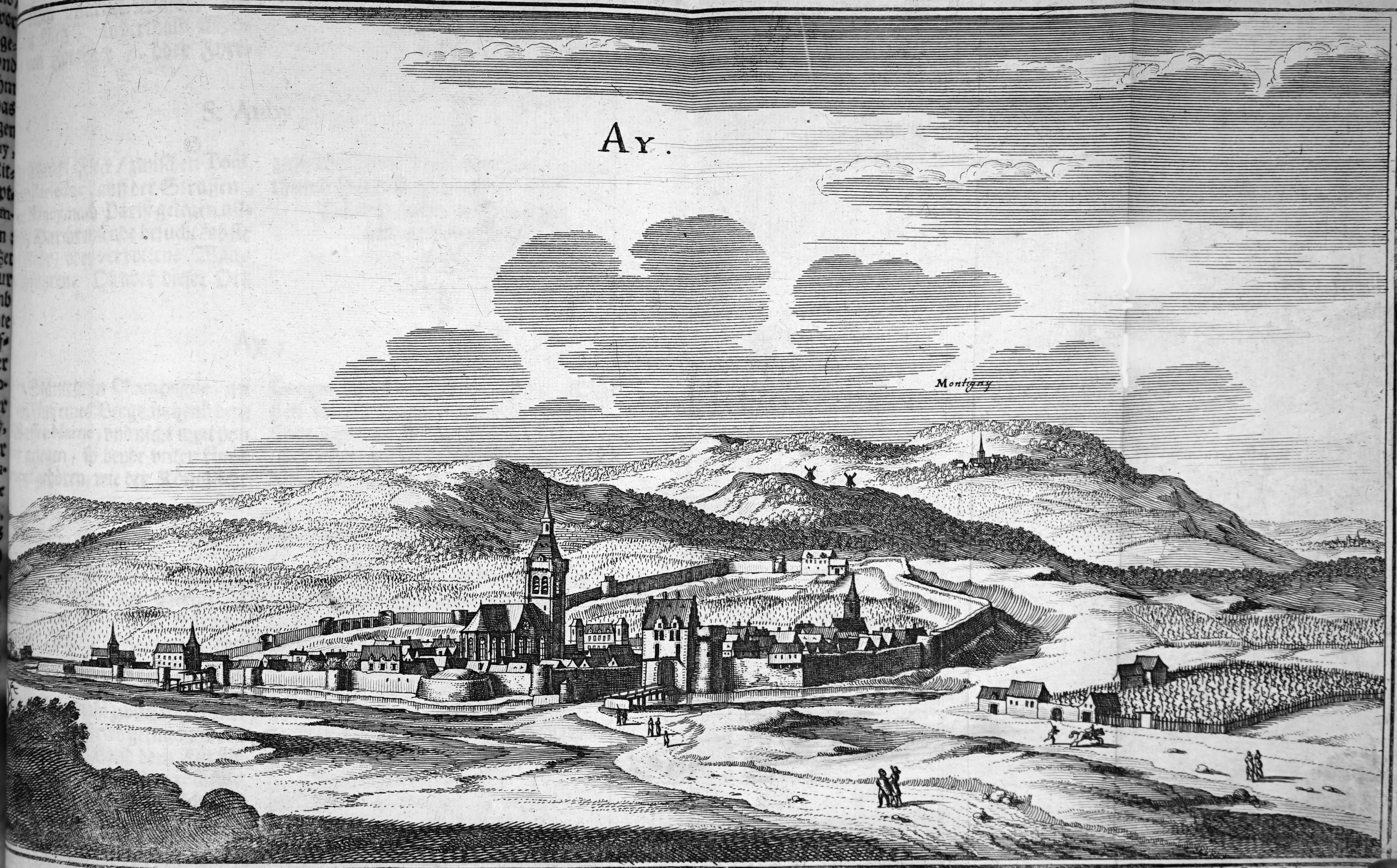 dessin extrait du livre.